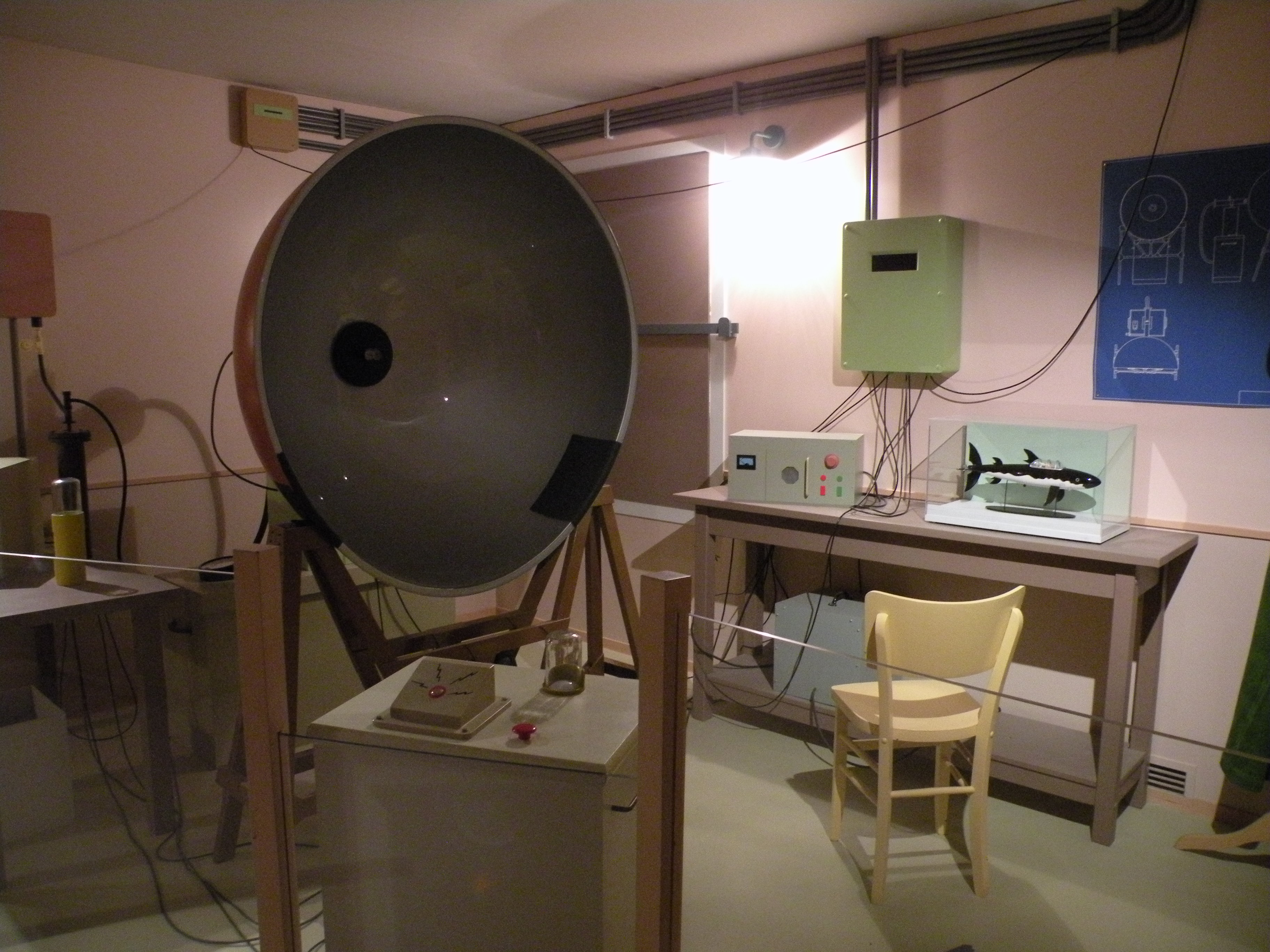 Château de Cheverny (Exposition Tintin)